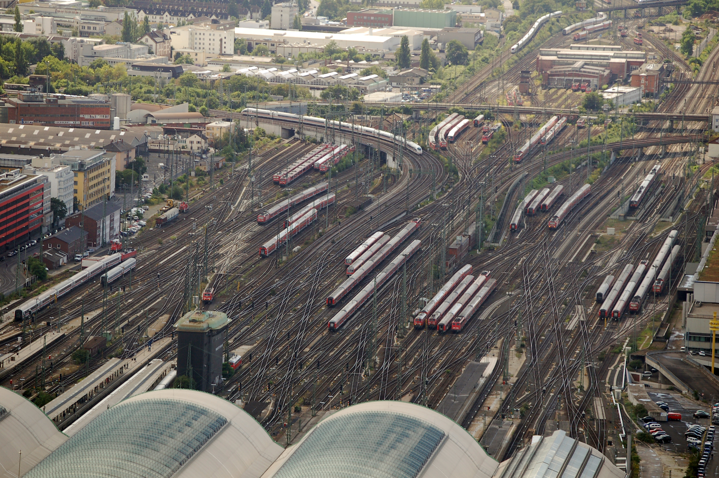 Zhlaví hlavního nádraží ve Frankfurtu nad Mohanem